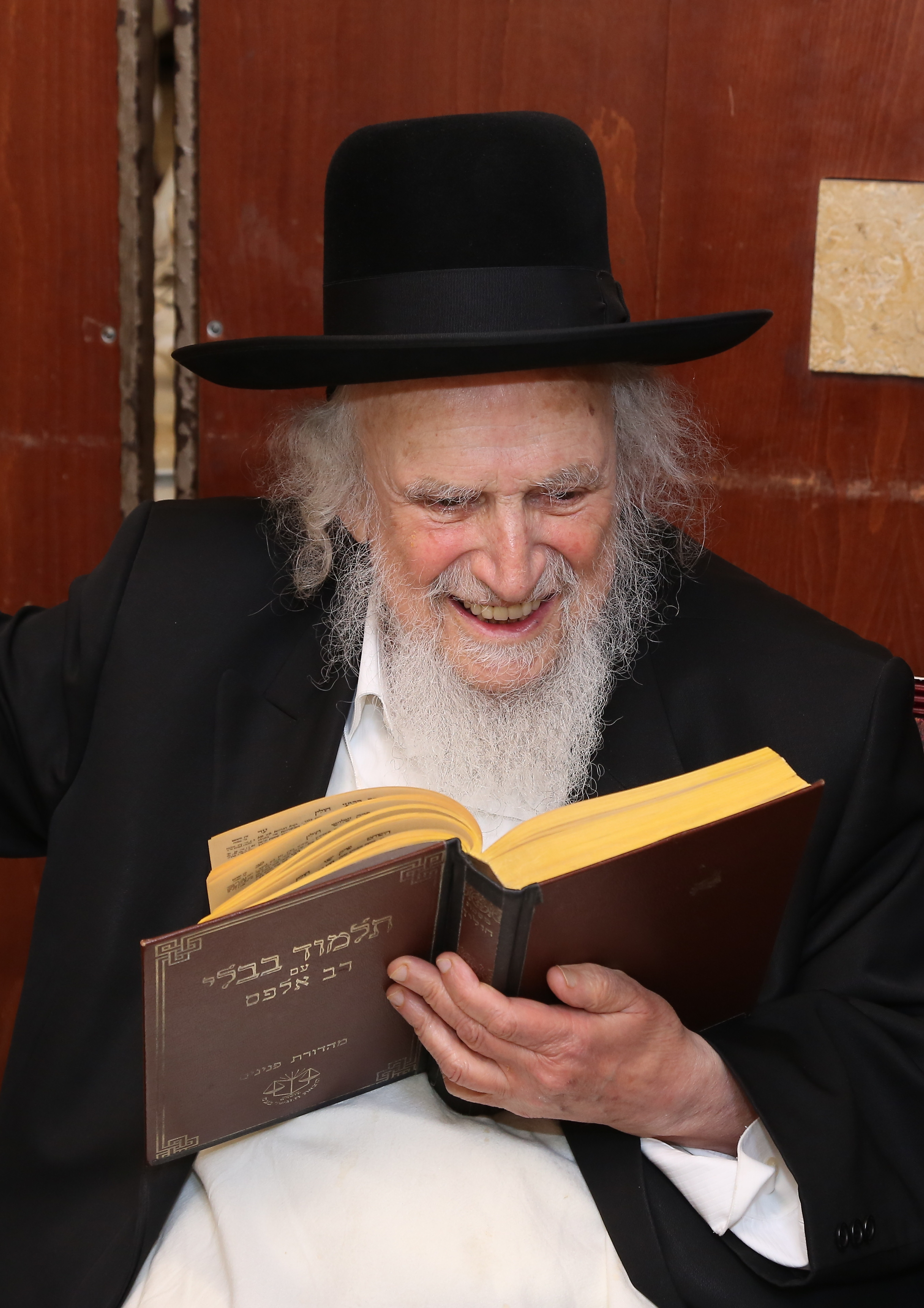 הרב שמואל אויערבך בלימוד